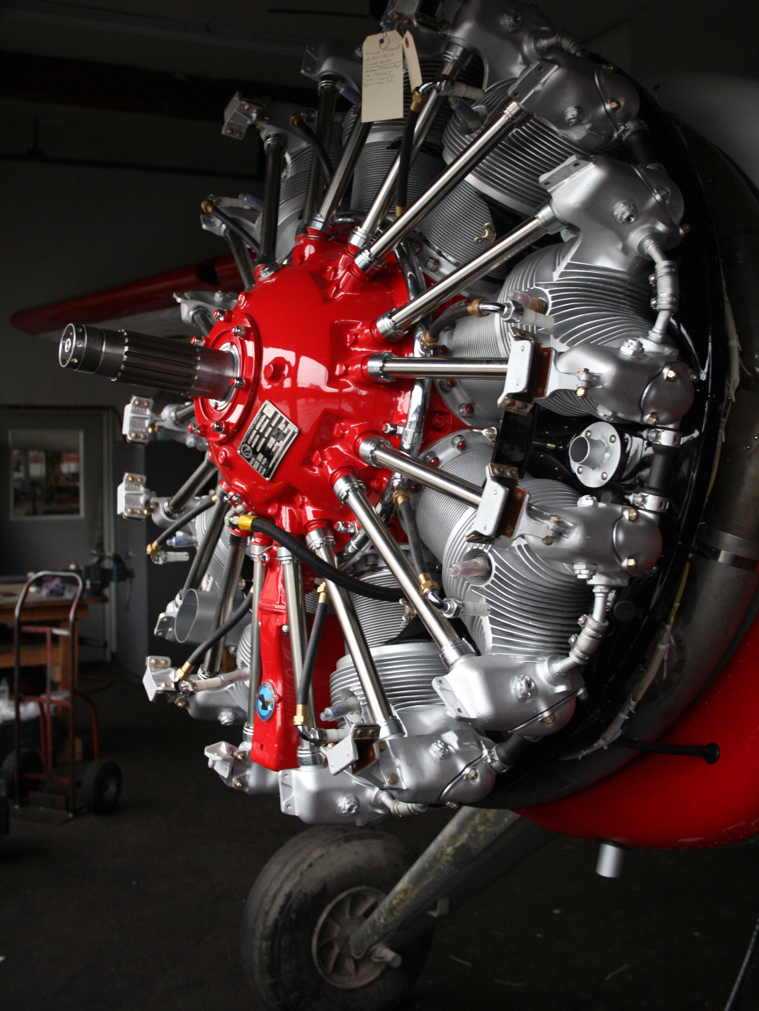 R-985